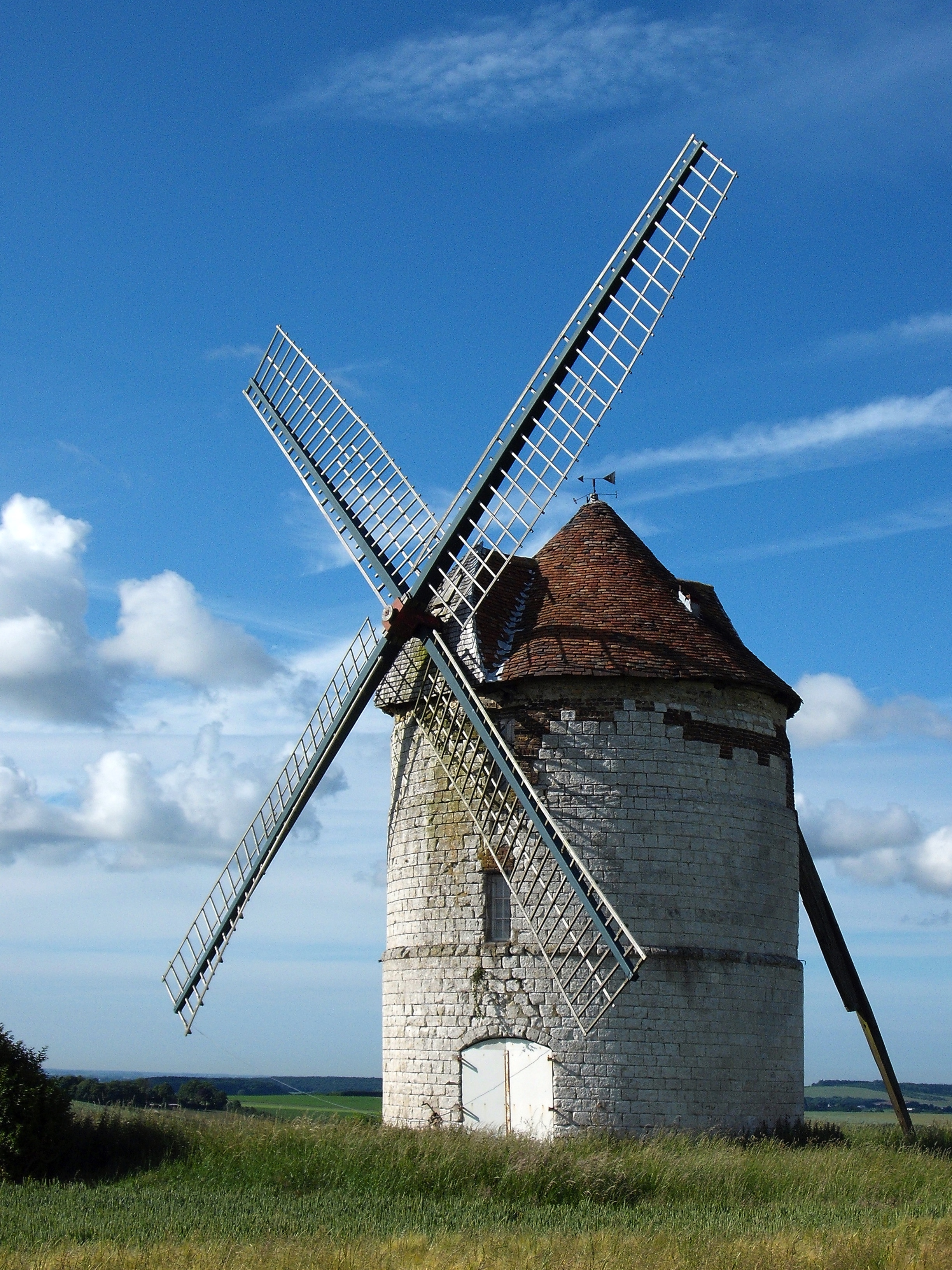 Le moulin à vent de Nortbécourt (Pas-de-Calais, France).